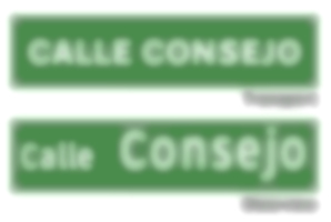 Comparación de dos placas de calle cuando se difuminan por efectos como el halo que producen los faros sobre el material reflectante.